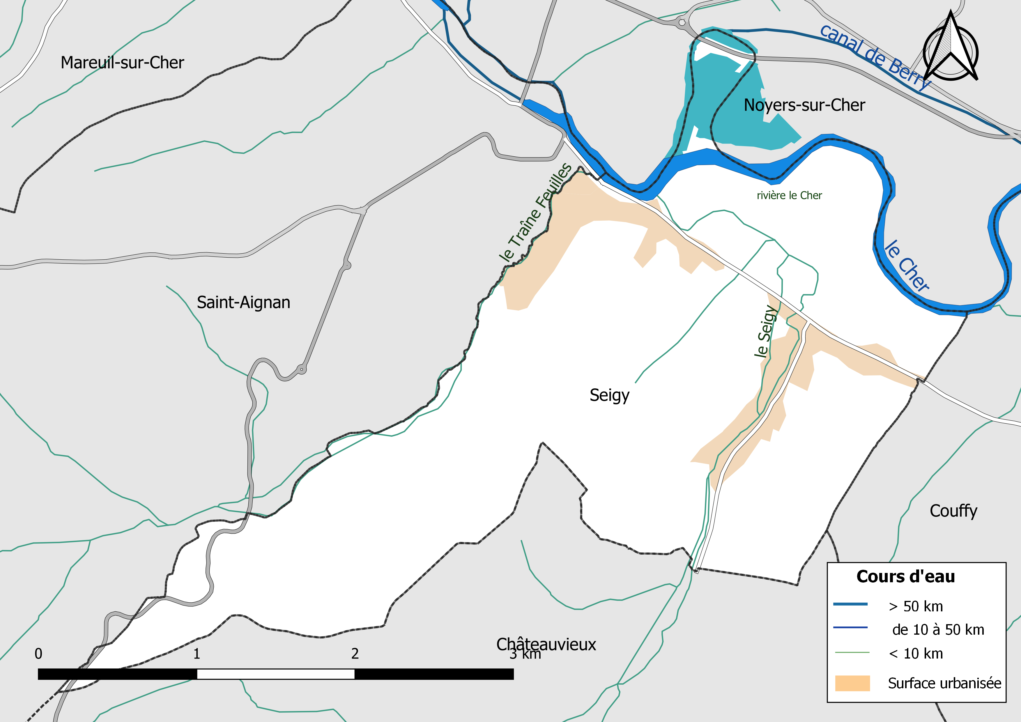 Carte du réseau hydrographique de la commune de Seigy (Loir-et-Cher, France).